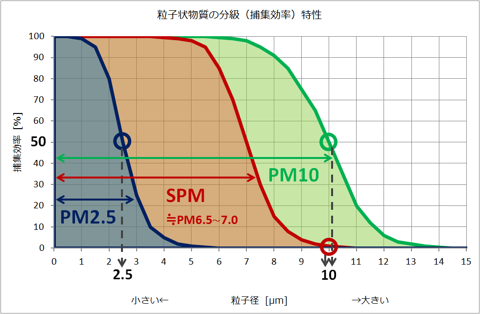 大気汚染物質の粒子状物質の分類。PM10、SPM、PM2.5の分級特性を捕集効率グラフで示す。 出典：新田「SPM，PM2.5，PM10，…，さまざまな粒子状物質」国立環境研究所、2001年。および、「微小粒子状物質健康影響評価検討会 第7回 資料2 適切な粒径のカットポイントの検証」「環境大気常時監視マニュアル 第6版 第3章 大気汚染自動測定機」環境省。